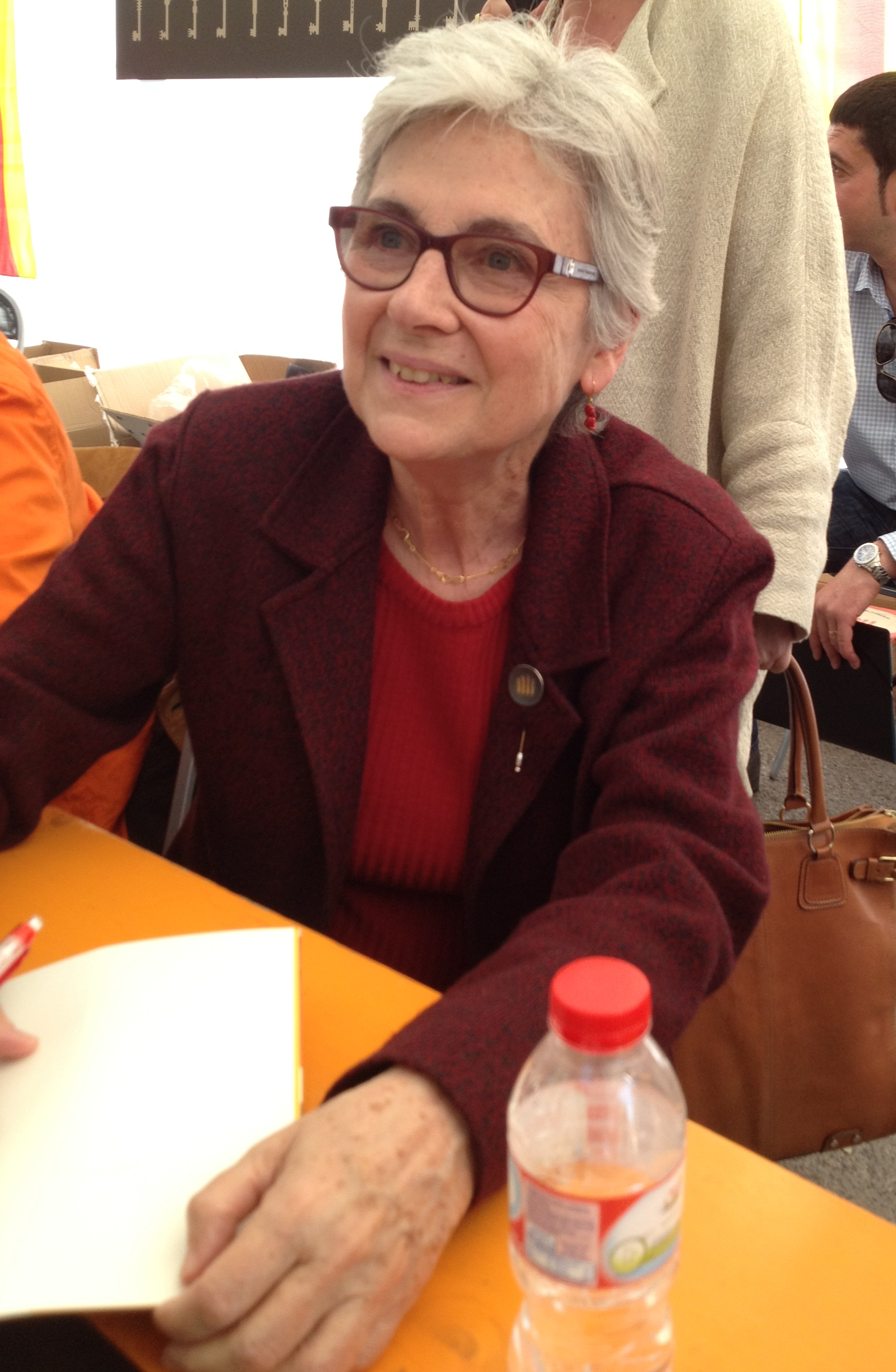 Muriel Casals, presidenta d'Omnium Cultural, signant llibres a la diada de Sant Jordi de 2013